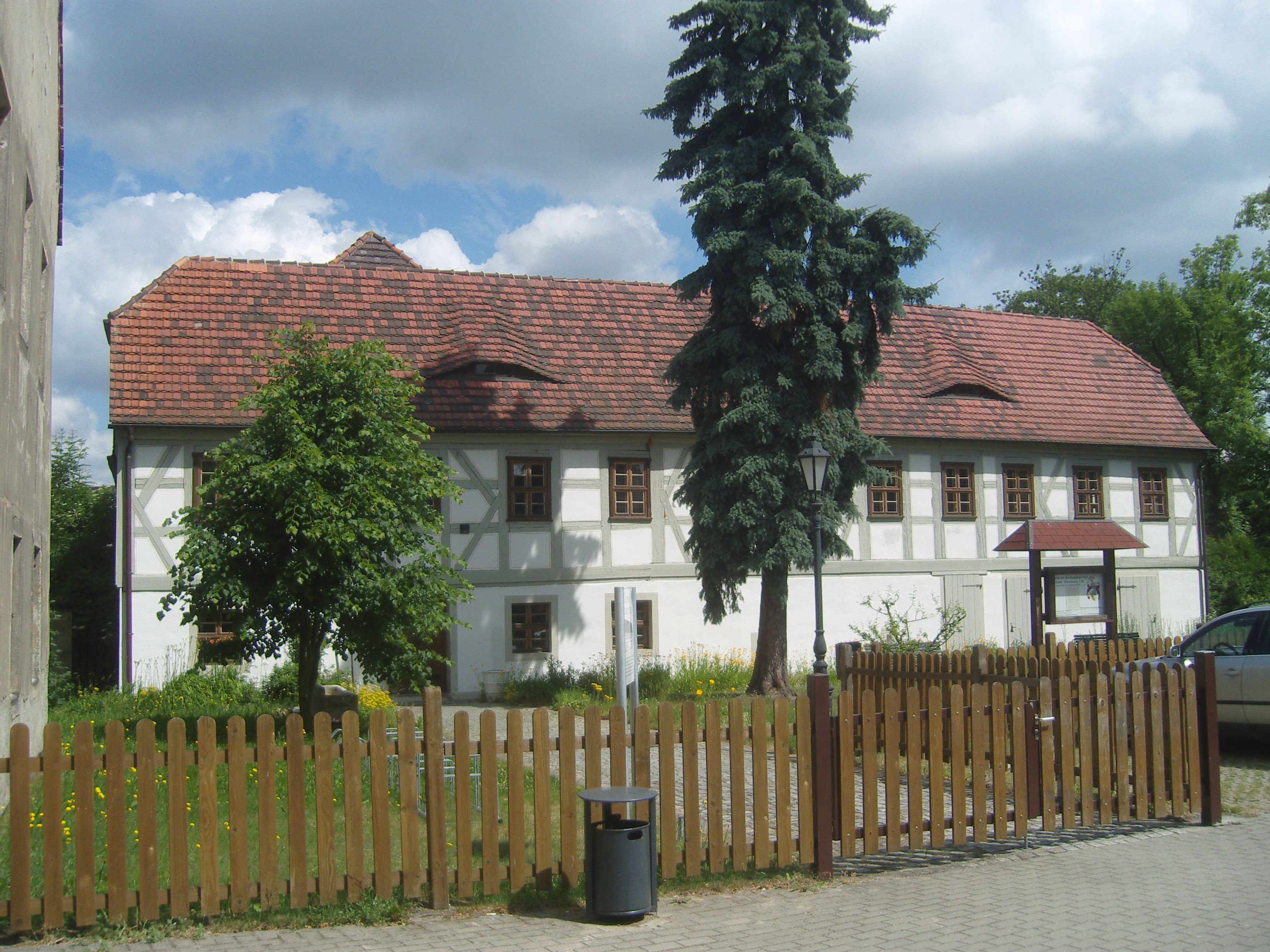 Gutshaus in Ruhland; Baudenkmal; Ruhland, Gutshof 2; Heimatmuseum, rechts oben ist die Außenstelle Ruhland der Musikschule OSL untergebracht